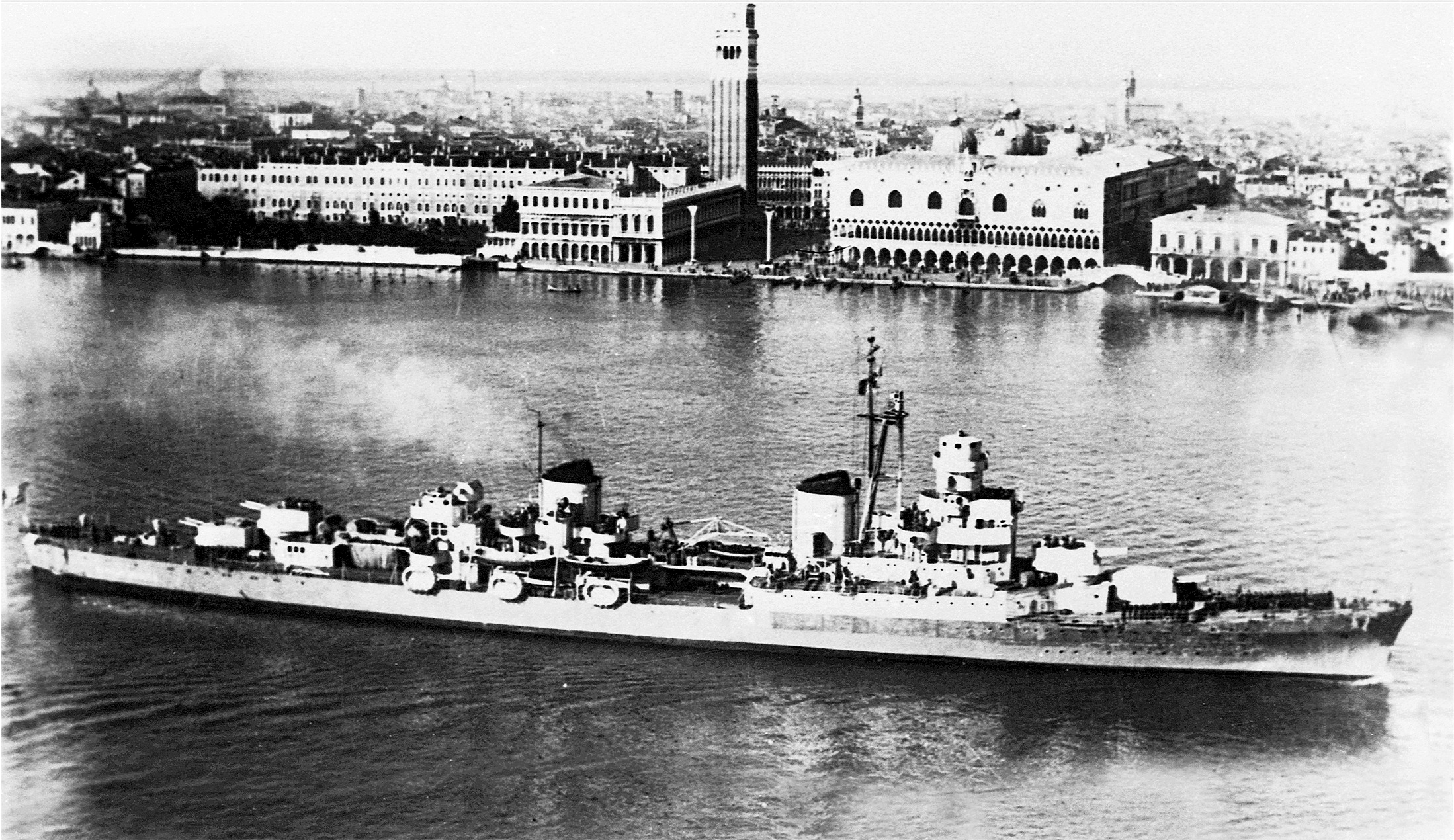 L'incrociatore Attilio Regolo a Venezia nel 1946. La bandiera è quella nazionale, priva dello stemma sabaudo in conseguenza della proclamazione della repubblica e prima che con DL 1305 del 9 novembre dello stesso anno venisse adottata la nuova insegna navale